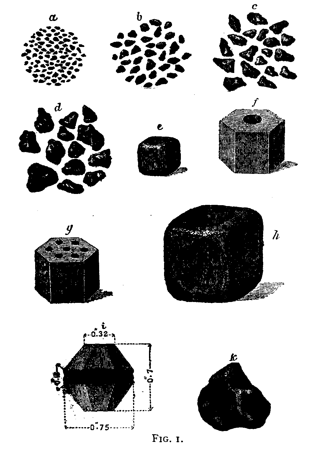 gunpowder